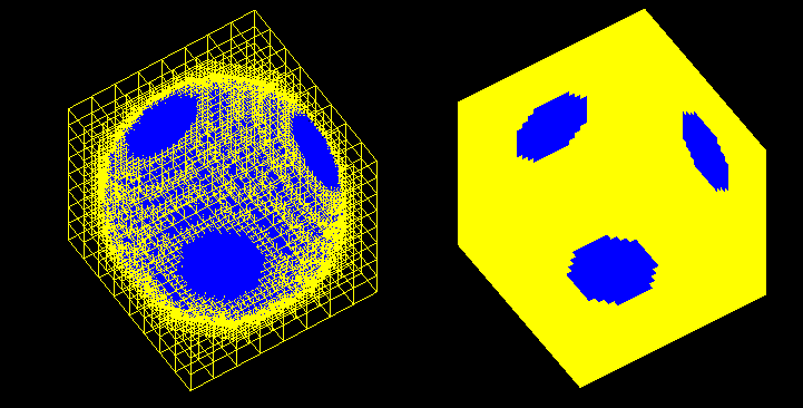 Esfera em Octree nível 7